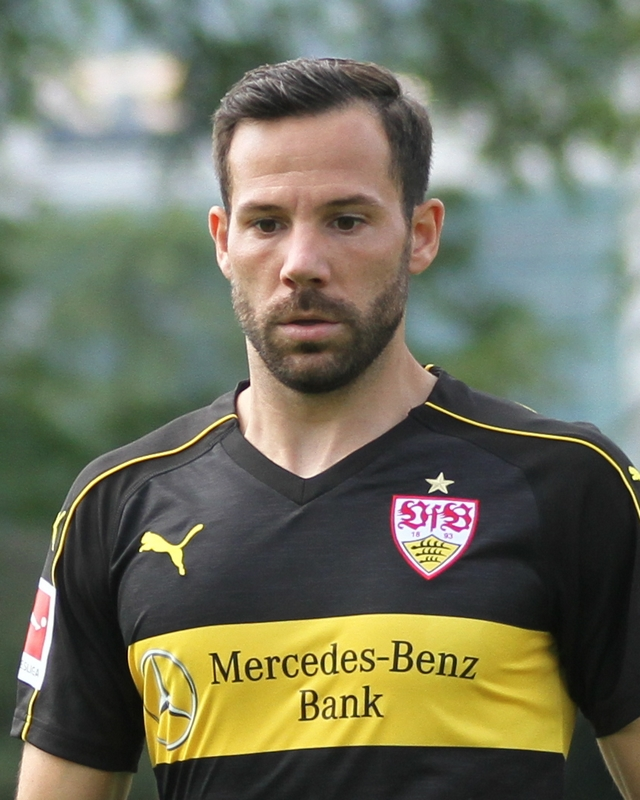 Gonzalo Castro beim offiziellen Trainingsauftakt. Aufgenommen von